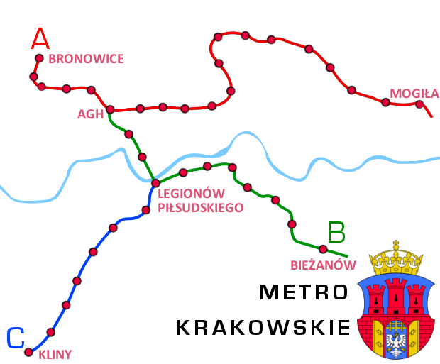 Schemat przedstawia docelową sieć metra w Krakowie.